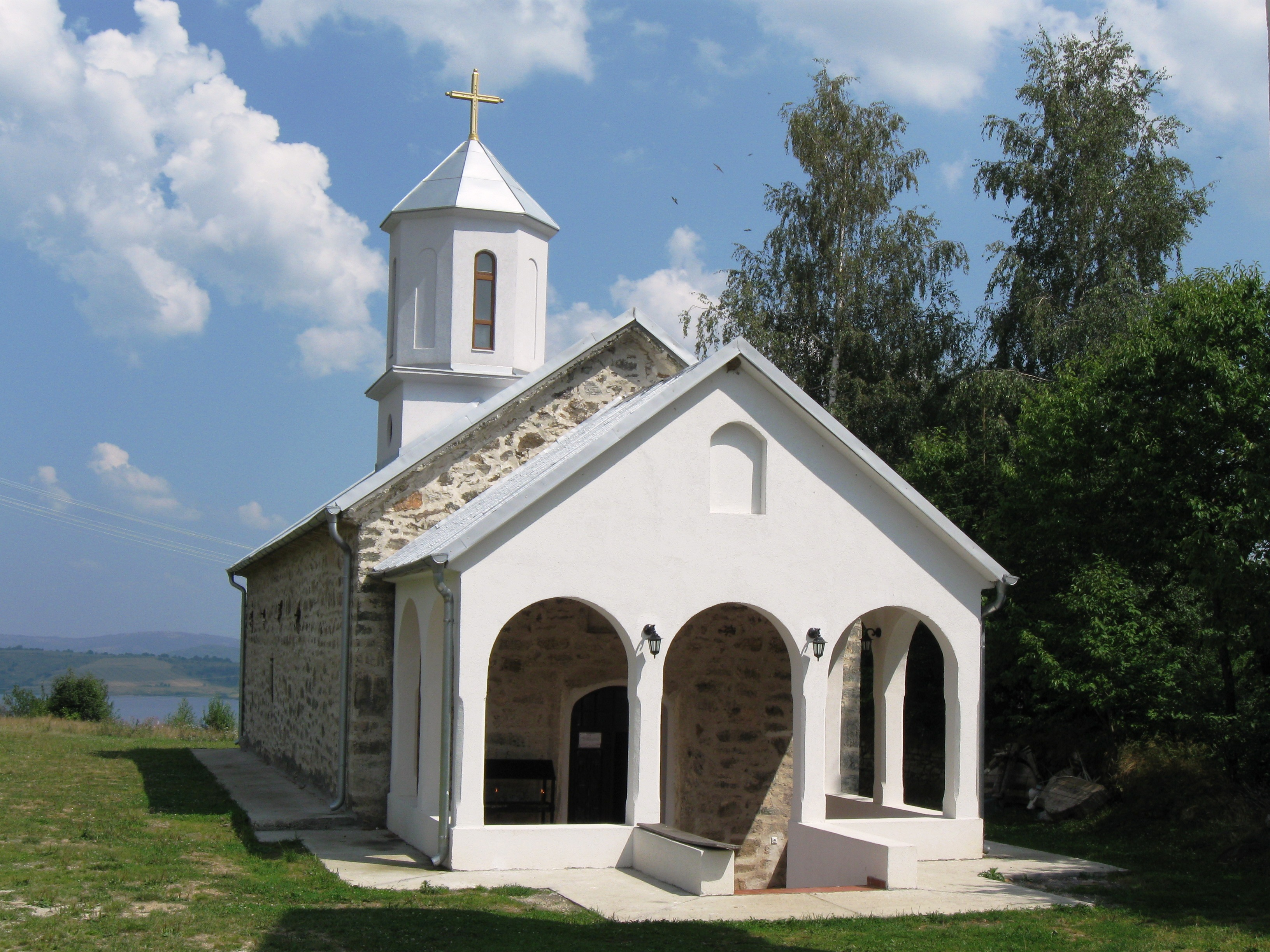 Цркву на Власини Риду сам снимио ја - Радосав Стојановић и дајем је Википедији на највну употребу.